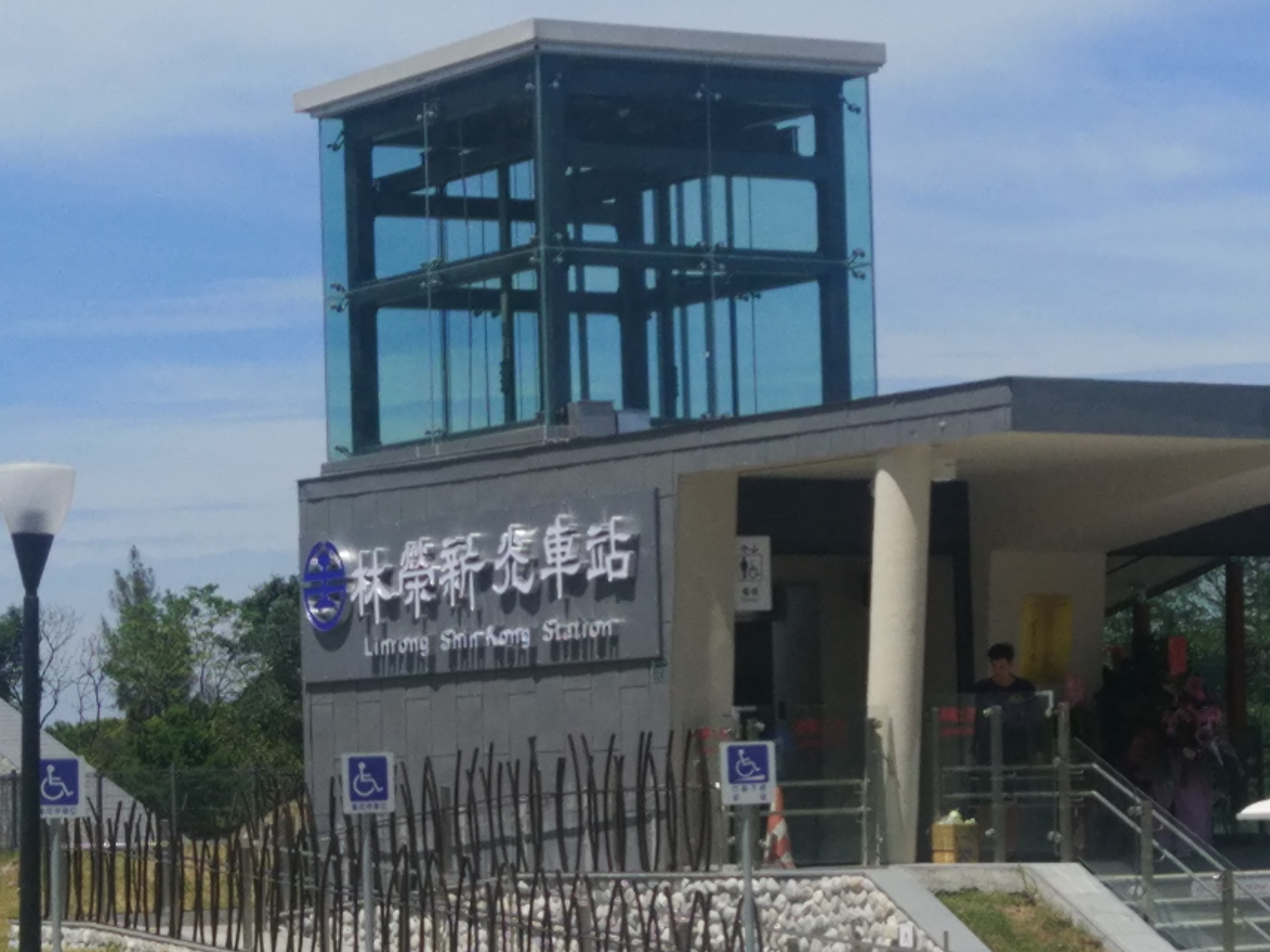 中文（台灣）: 台鐵林榮新光車站站體